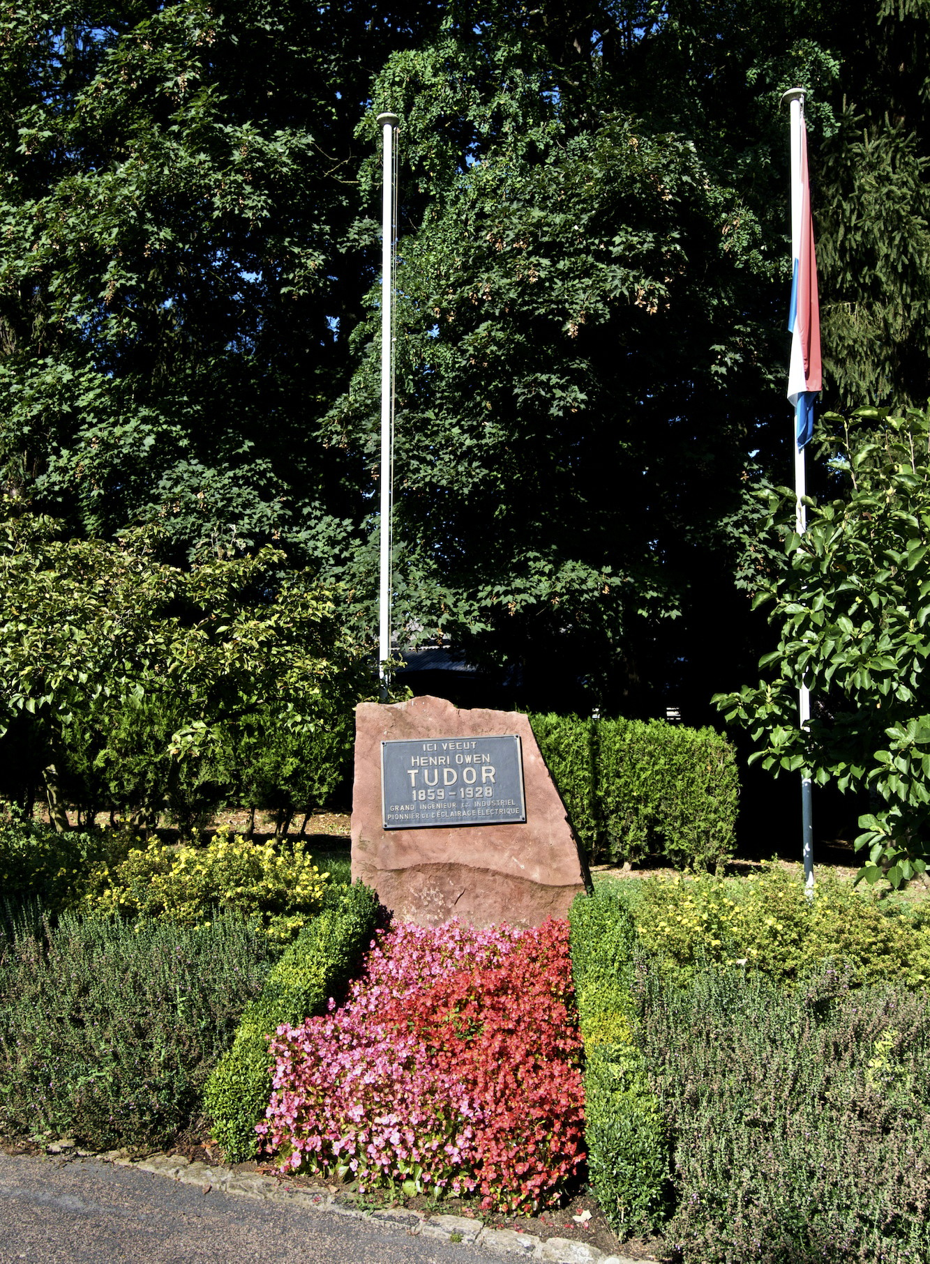 Tudor-Monument am Rousperter Park - 9. September 2008. Henri Tudor, gebuer den 30. September 1859 um Diesburgshaff (Diesburger Hof) bei Ferschweiler an der Äifel, a gestuerwen den 31. Mee 1928 zu Rouspert war e lëtzebuergeschen Ingenieur an Erfinder vum éischte brauchbare Bläiakkumulator. Source:Eege Foto vum Benotzer:Cornischong